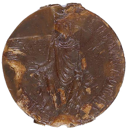 Sceau scellant un arrêt de la cour du roi Louis VII qui exempte le village de Lagny-le-Sec du droit de gîte, que Guillaume de Mello et les possesseurs de la terre de Dammartin prétendaient y exercer, 1175